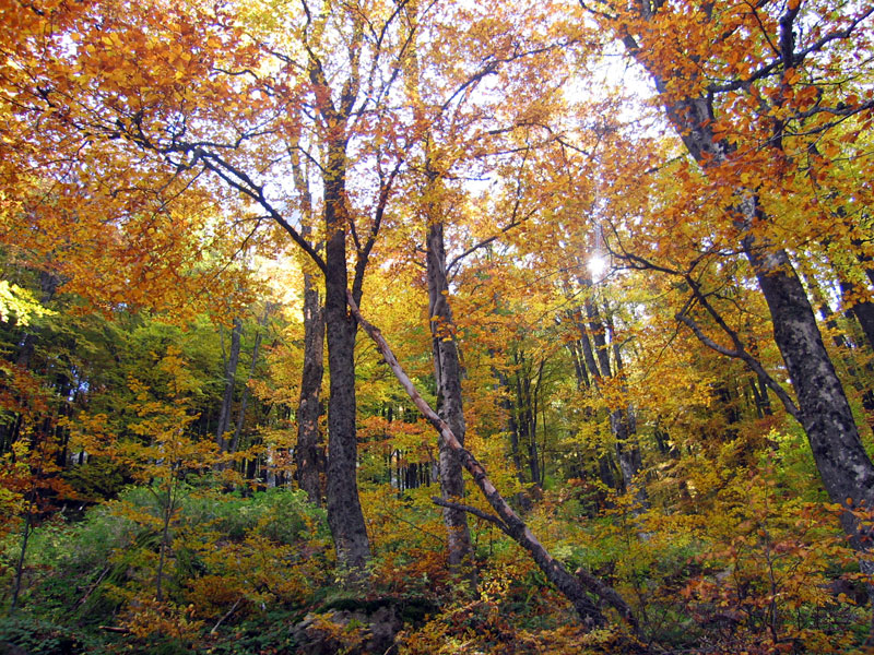 Šuma u jesen na Staroj planini